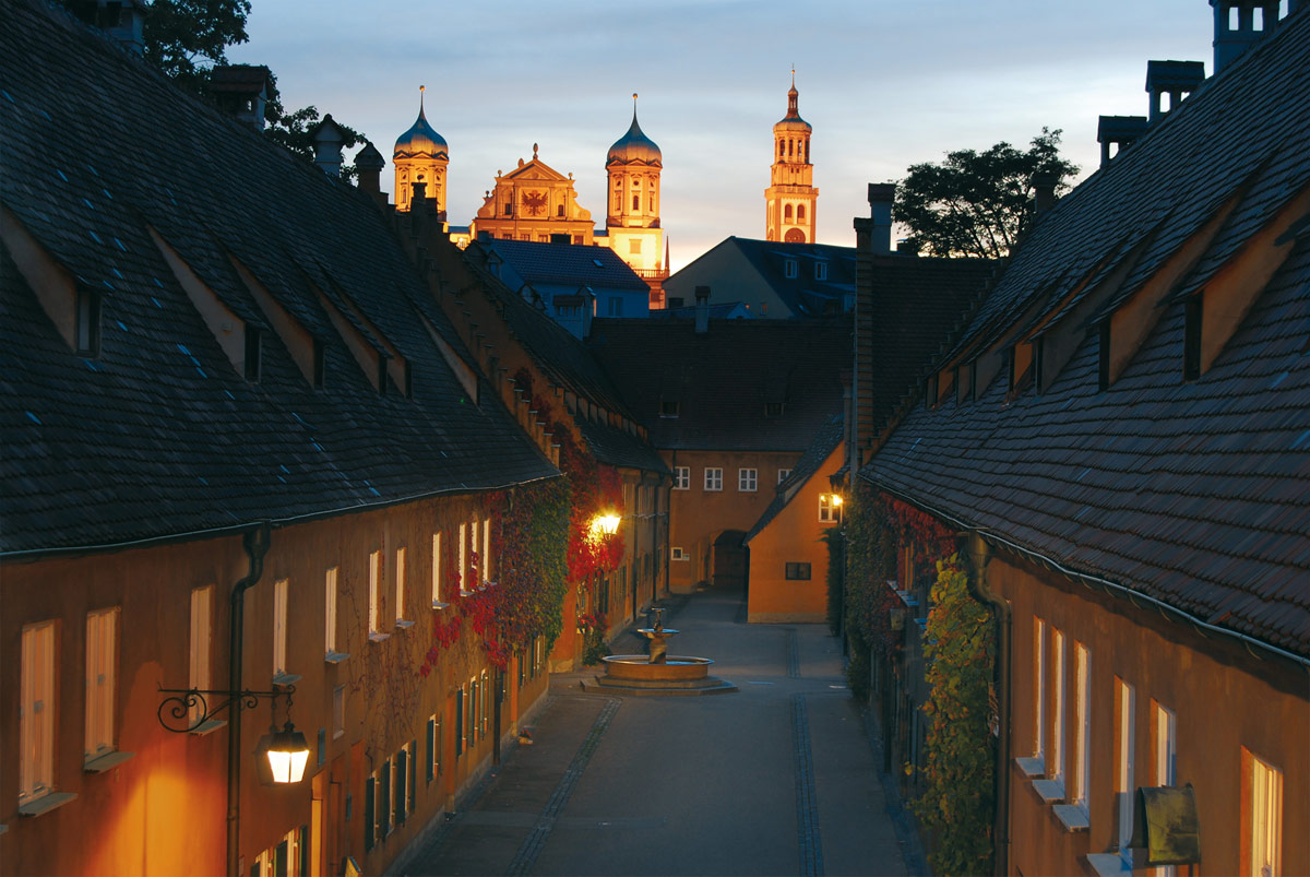 Fuggerei nachts